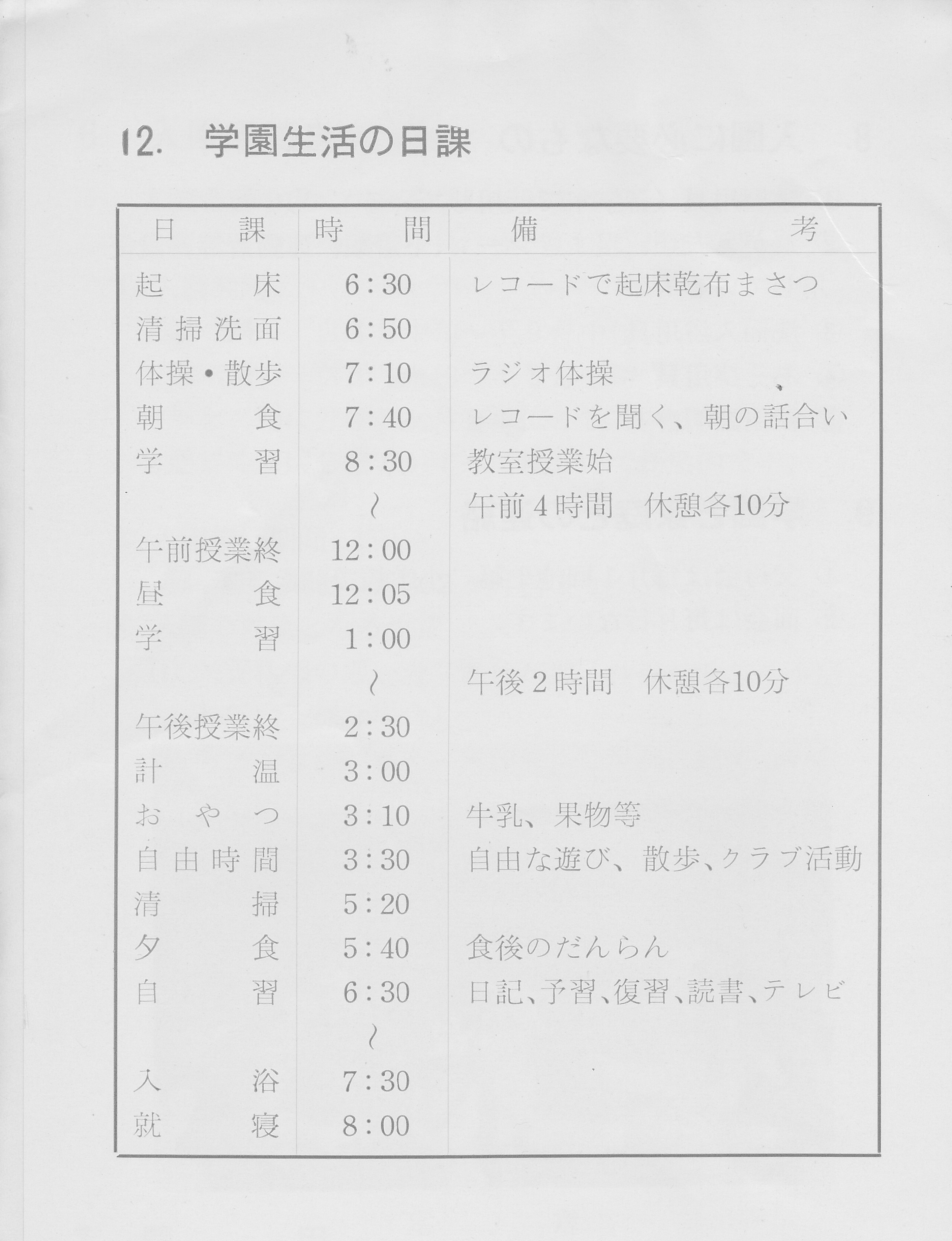 昭和44年当時の同学園日課表